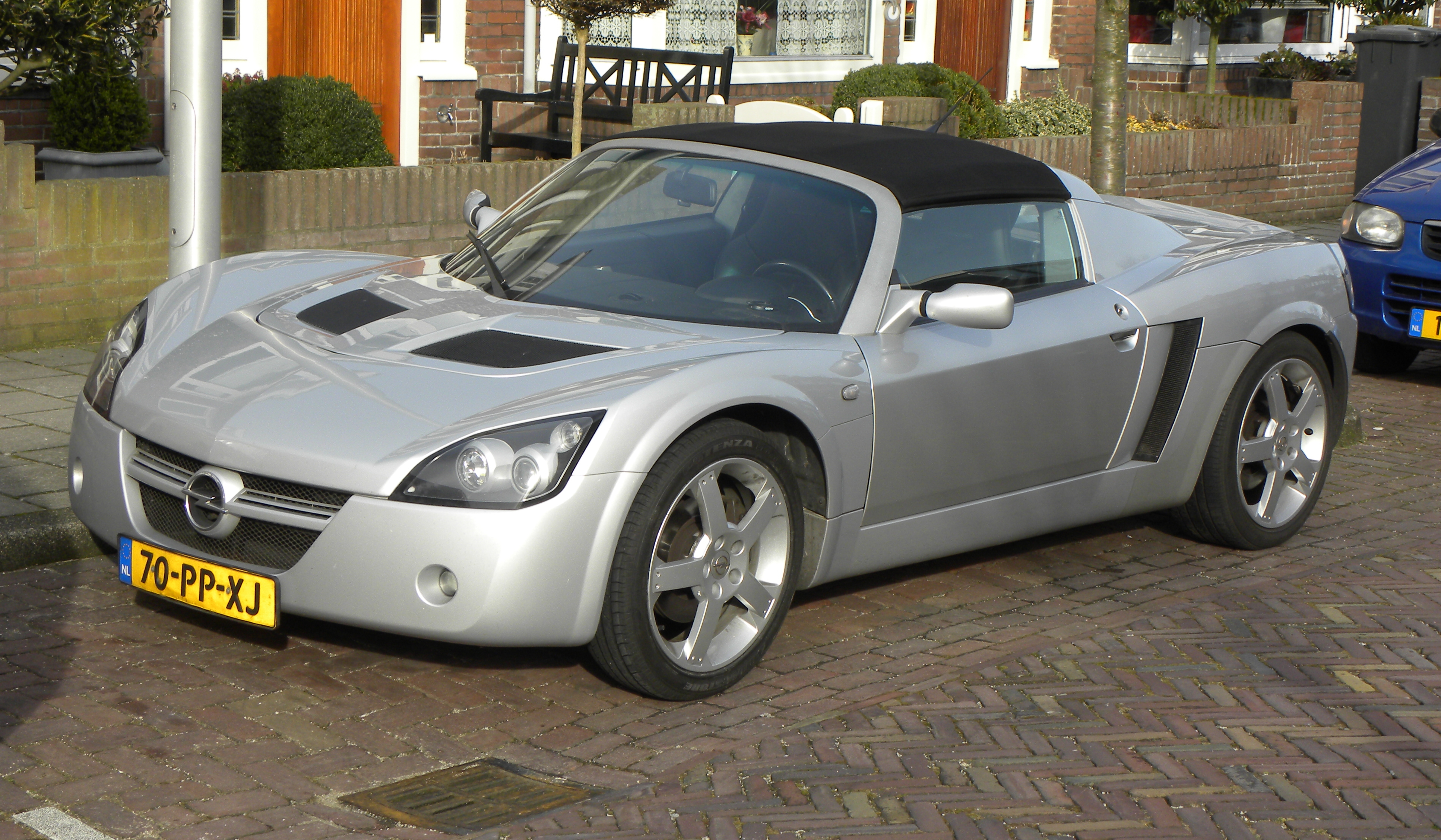 Opel Speedster